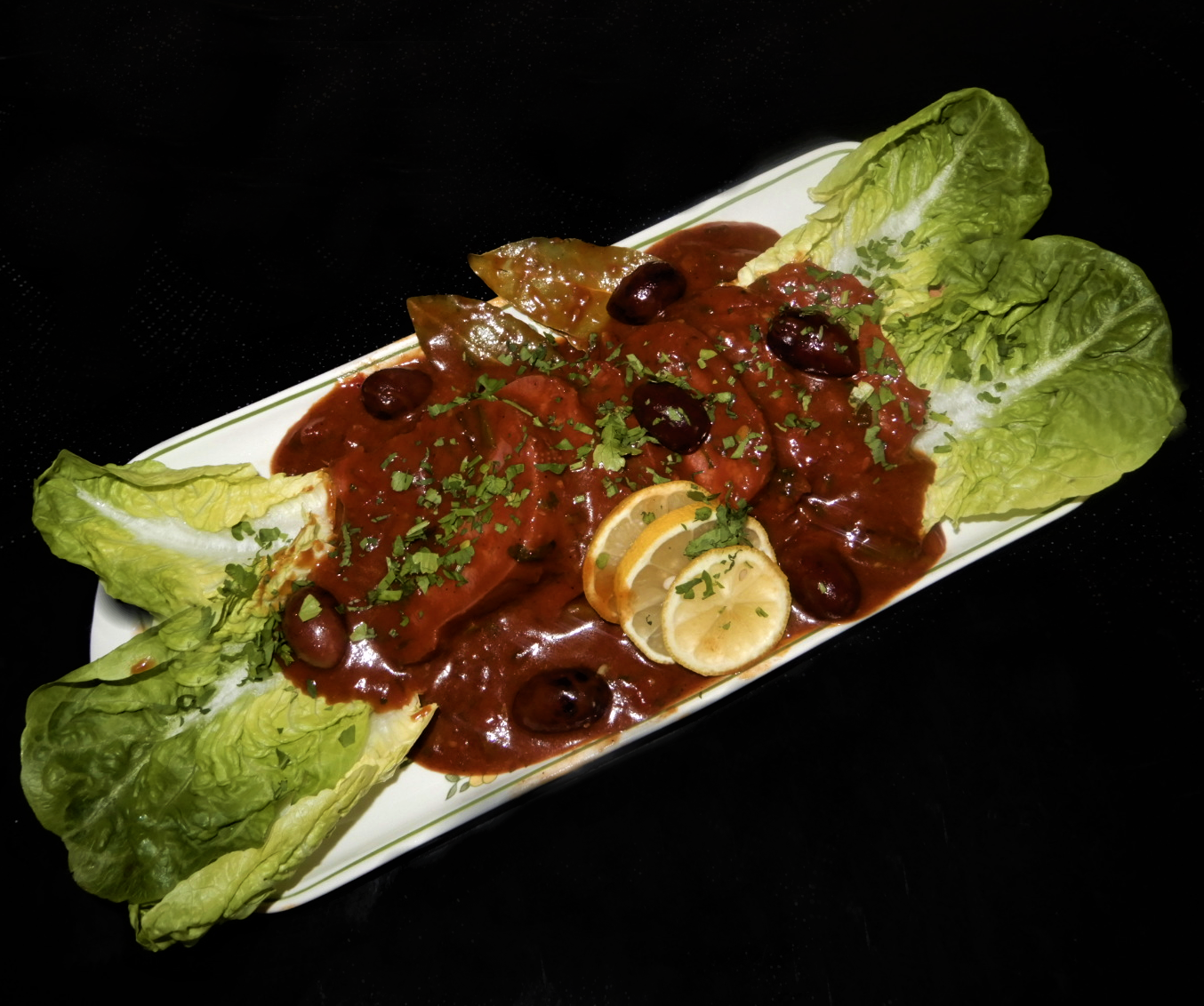 Zunge mit Oliven in Tomatensauce, kalt